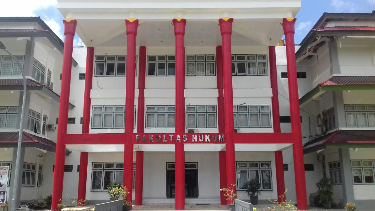 Gedung Fakultas Hukum Universitas Pattimura